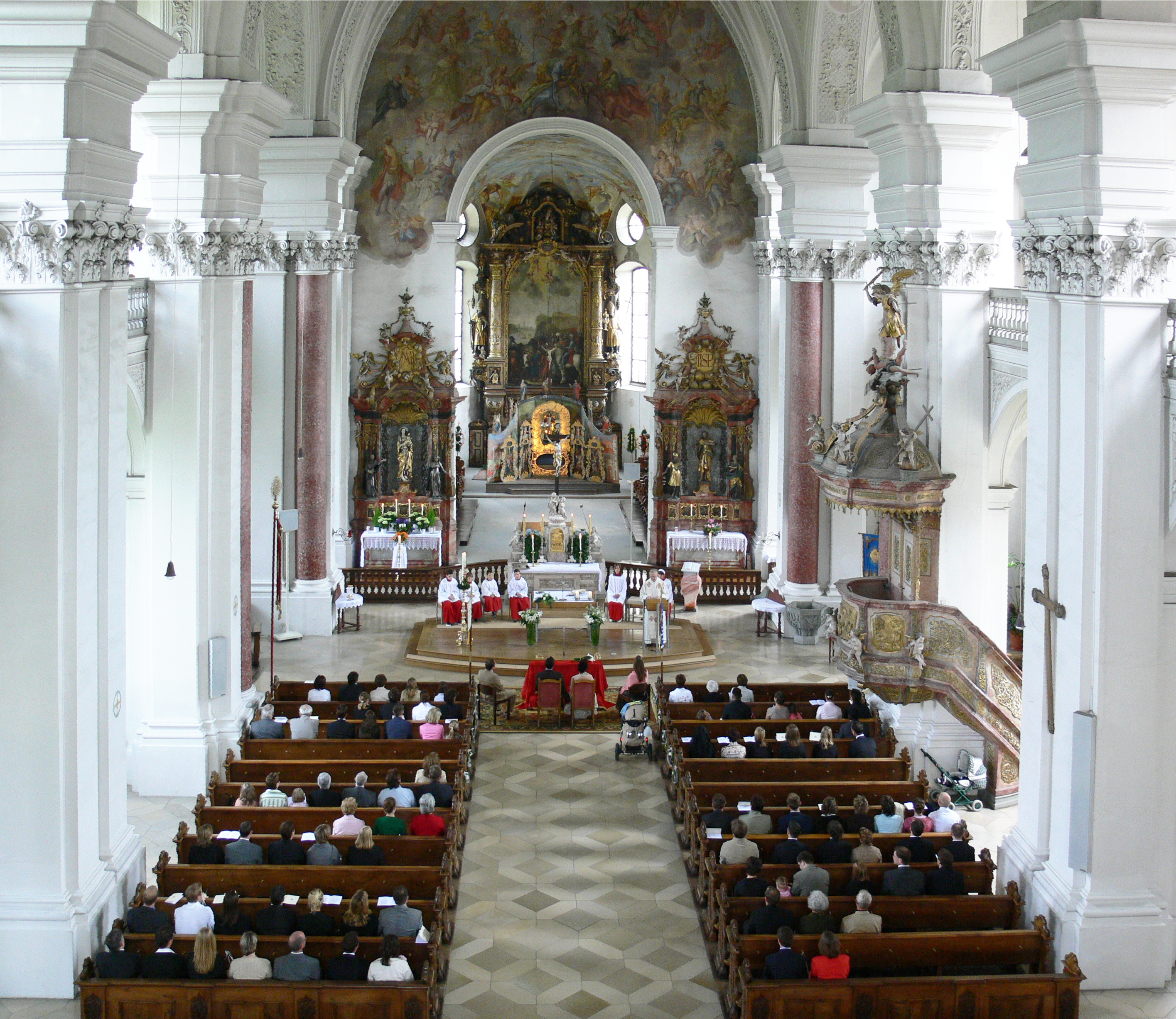 Ravensburg, Weißenau, ehem. Klosterkirche Weißenau, Blick von der Empore